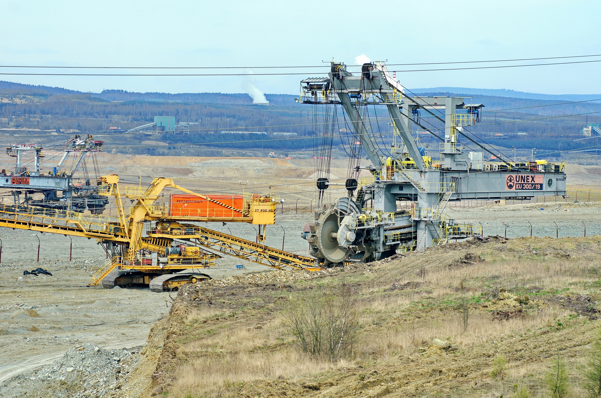 Povrchový hnědouhelný lom Jiří, okres Sokolov